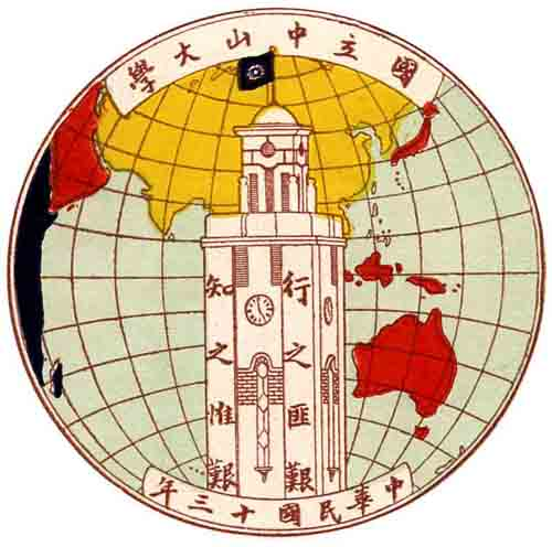 1932年至1949年國立中山大學（廣州）校徽。現在此建築為中國國民黨第一次全國代表大會舊址。